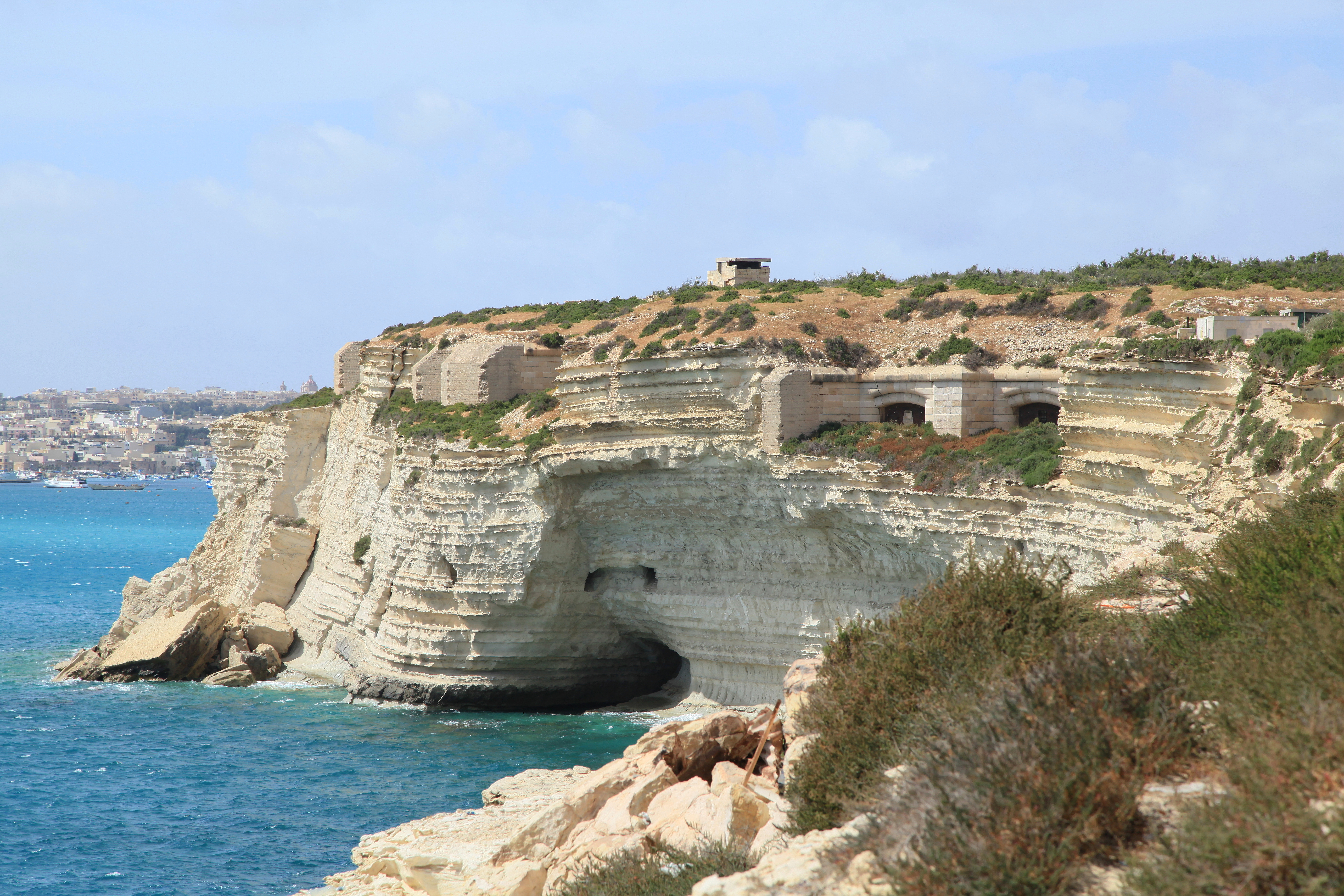 Fort Delimara, Triq Delimara in Marsaxlokk, Malta